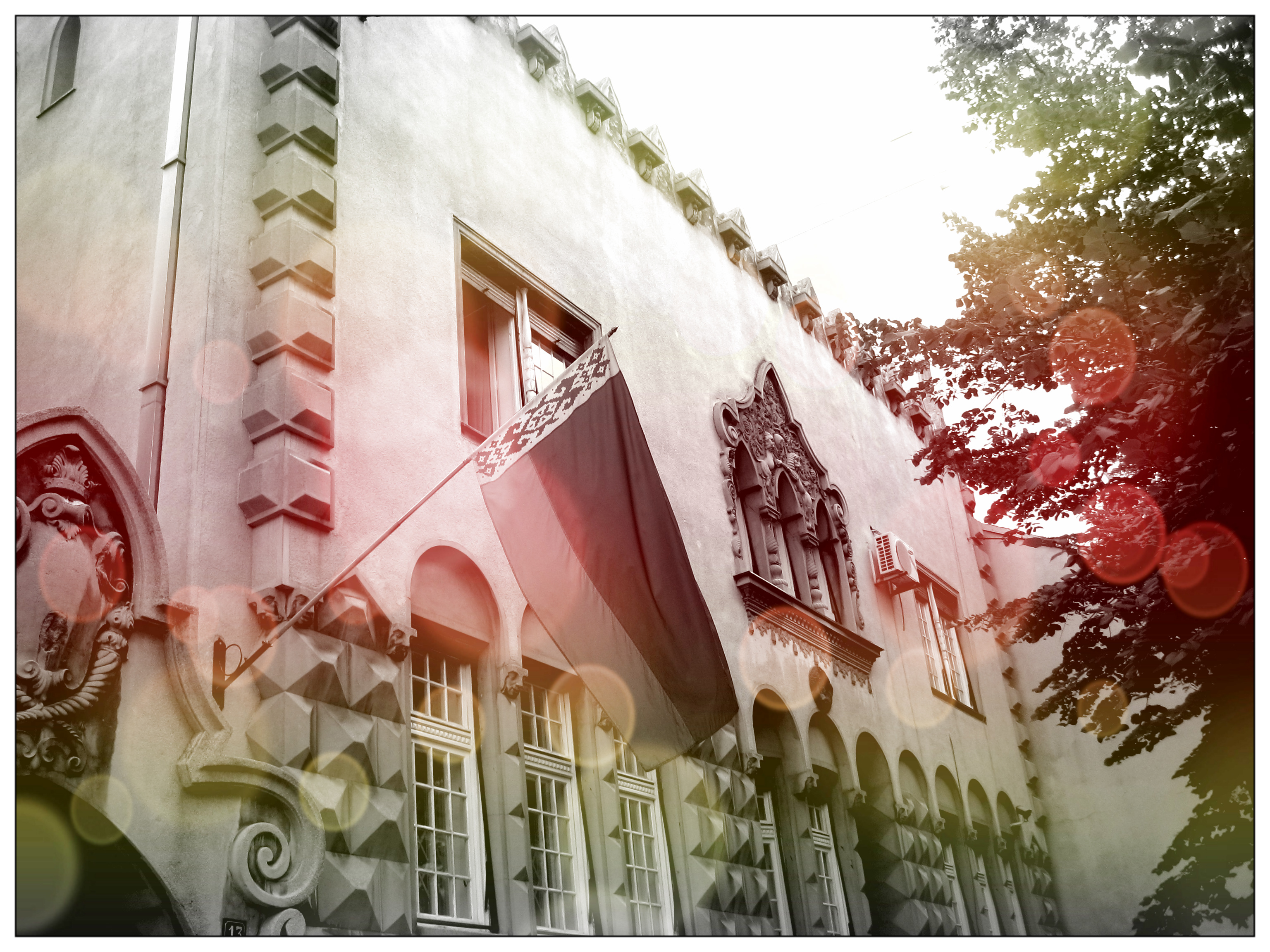 ulica Deligradska 13, Skarkina vila, danas ambasada Belorusije